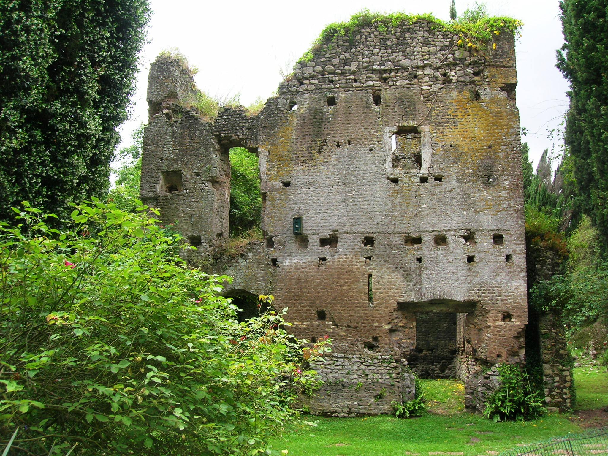 Rovine di un'antica abitazione di Ninfa